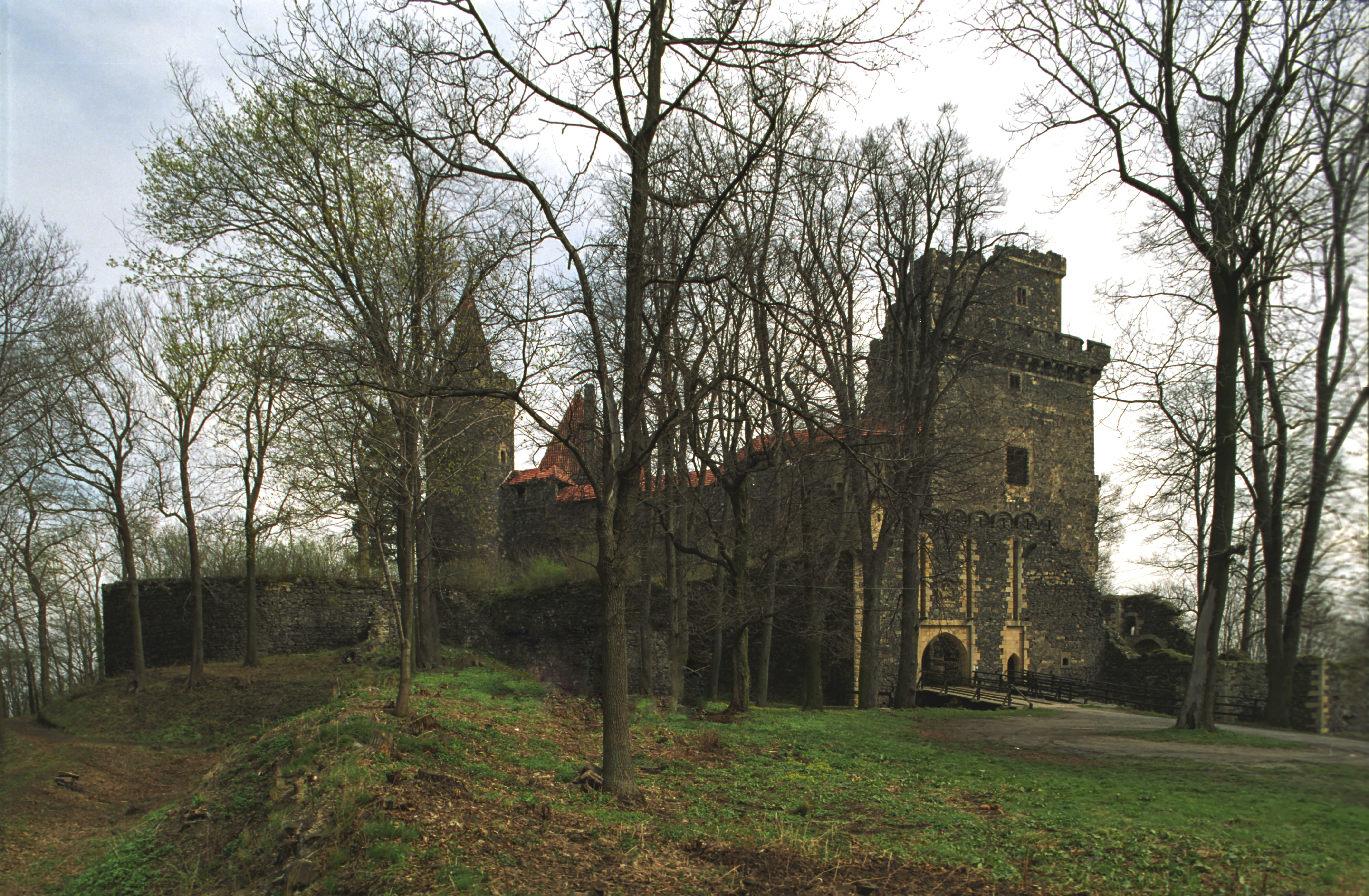 Poland, Grodziec Castle